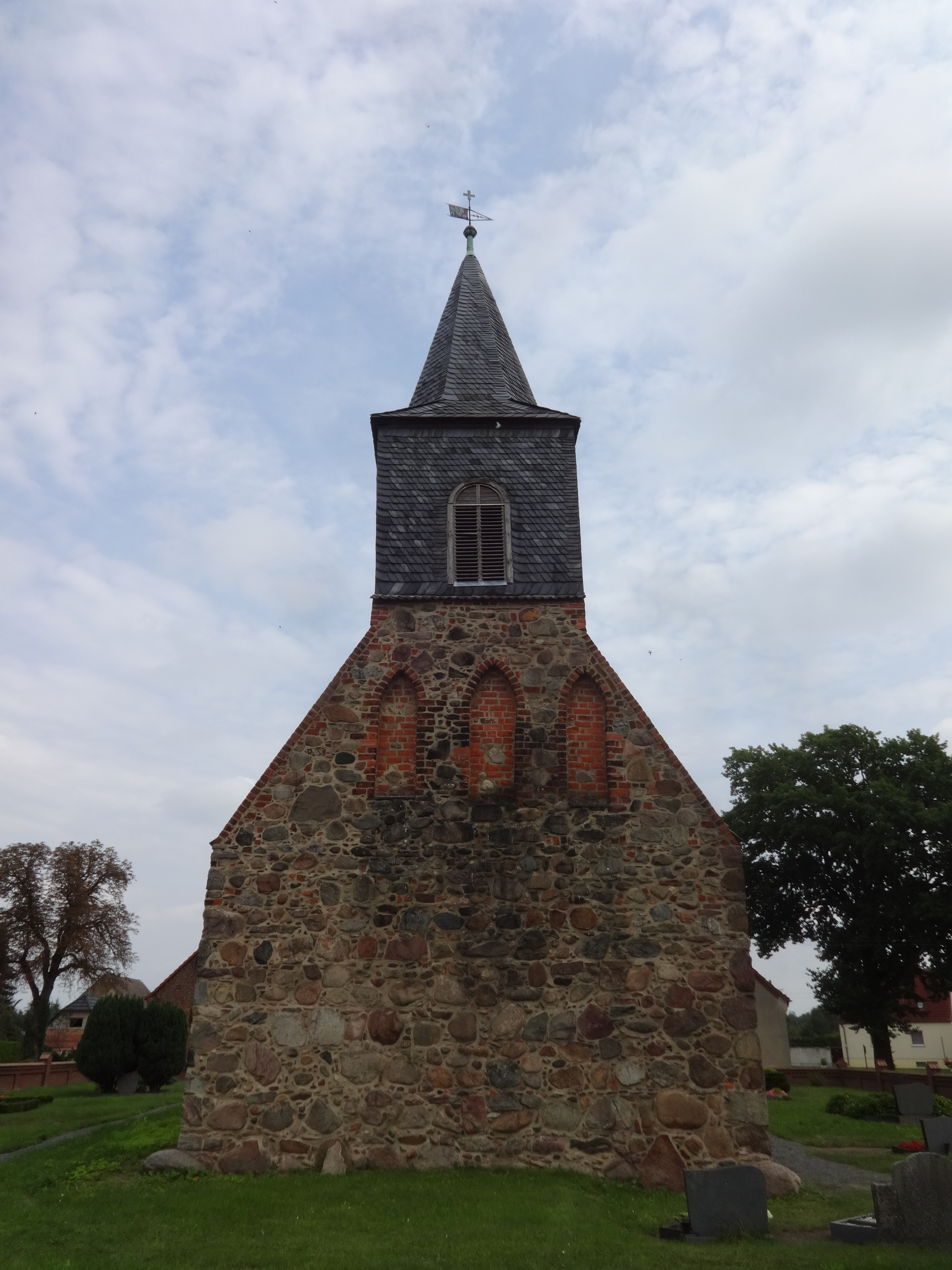 Die Dorfkirche in Neuhof (zu Jüterbog) entstand im 14. Jahrhundert. Im Innern steht unter anderem ein Kanzelalter aus der Zeit um 1700.